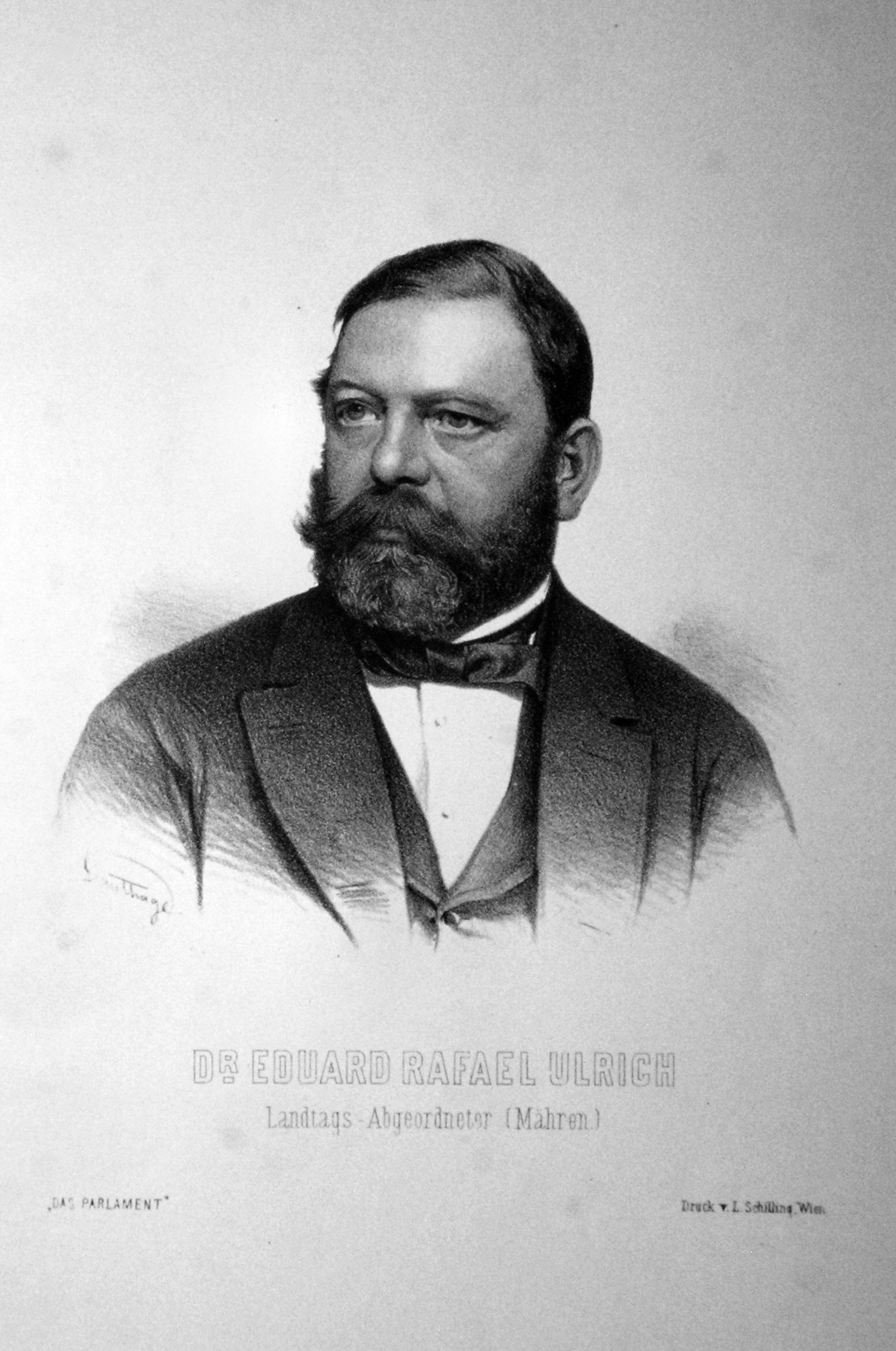 Dr. Eduard Raphael Ulrich (1813.1881), Jurist, Landtag und Reichsratabgeordneter für Mähren. Lithographie von Adolf Dauthage, ca.1880